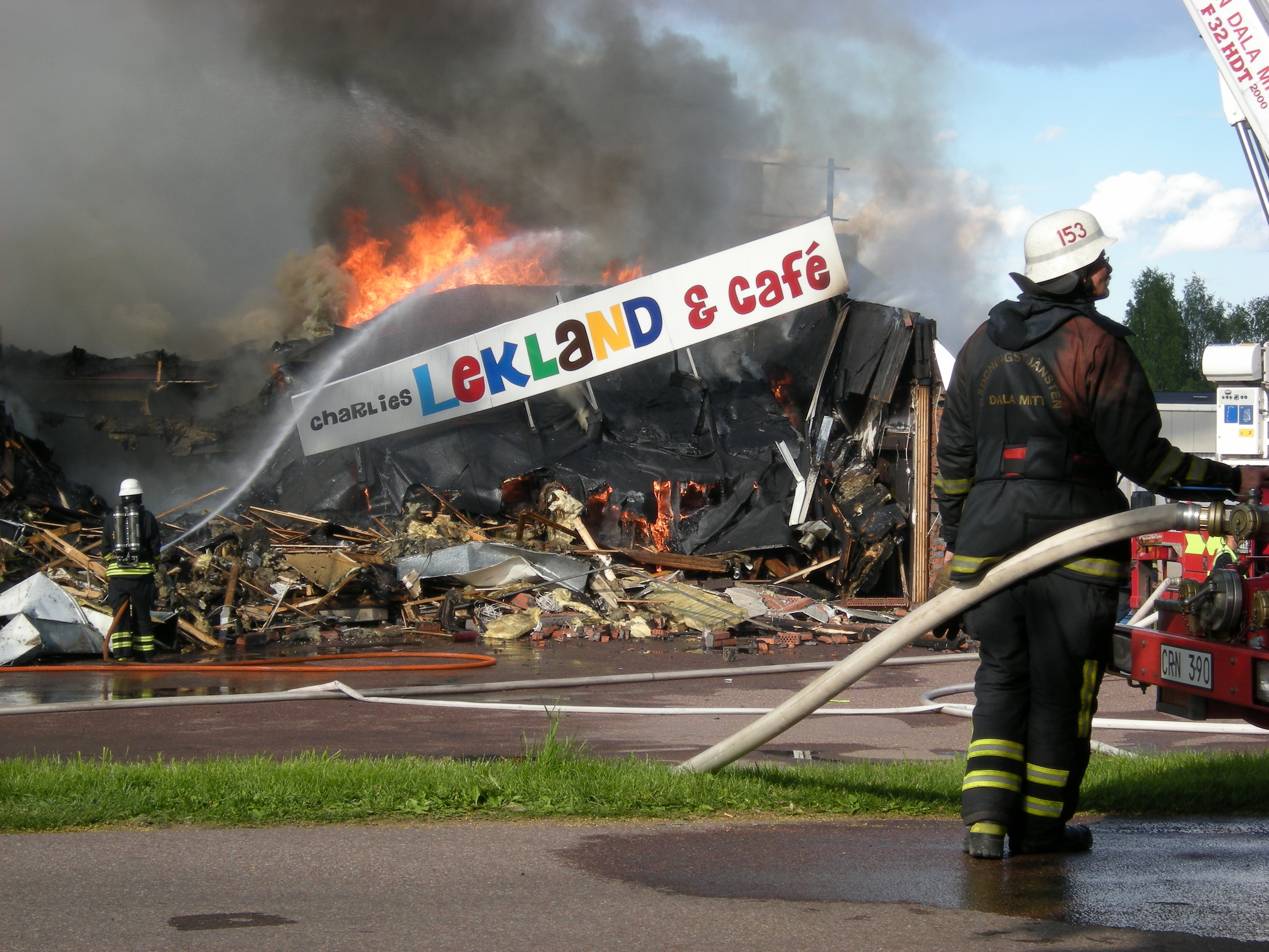 Brandman vid olycka, Borlänge, Dalarna